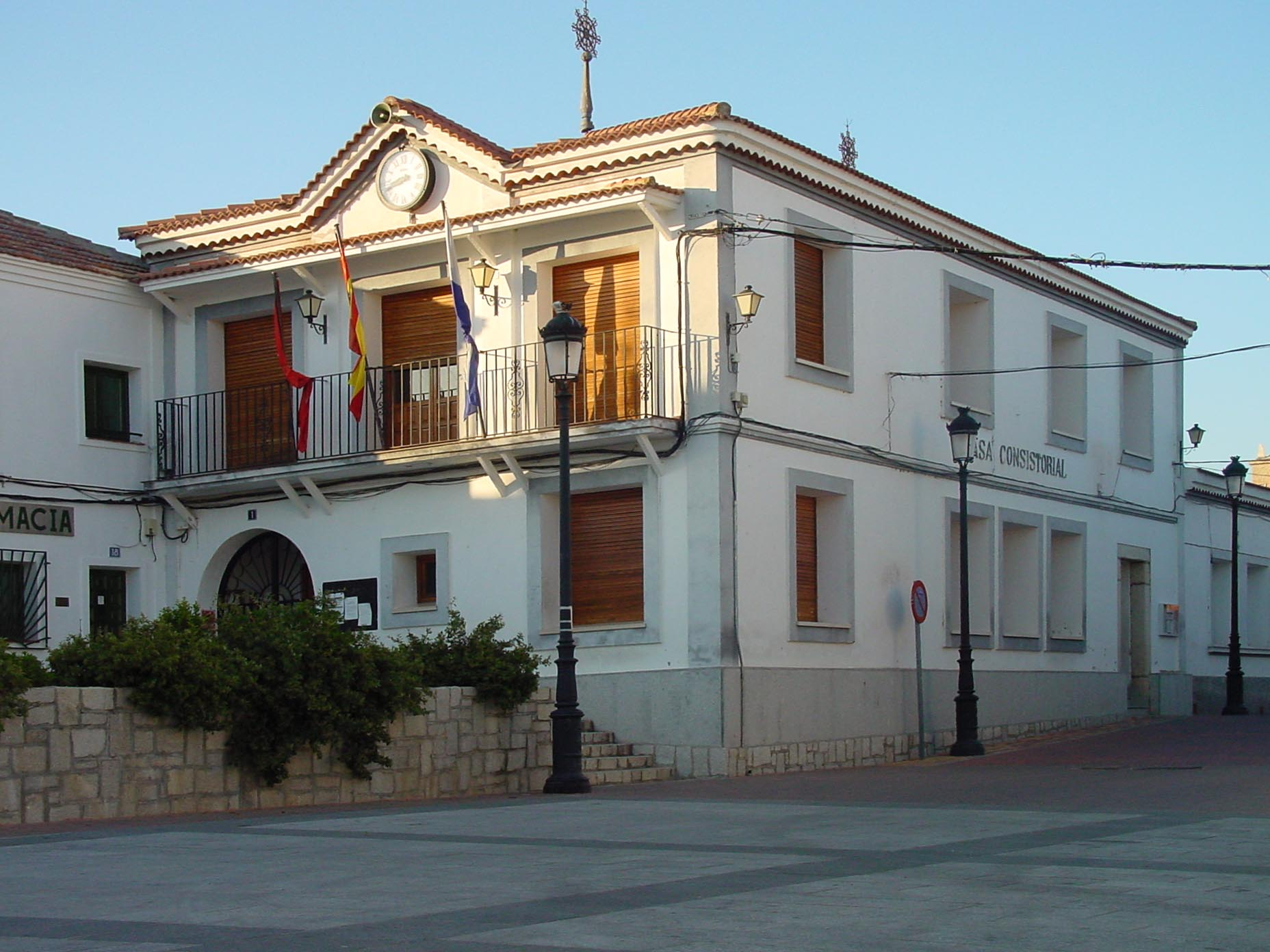 Ayuntamiento de Villamantilla.